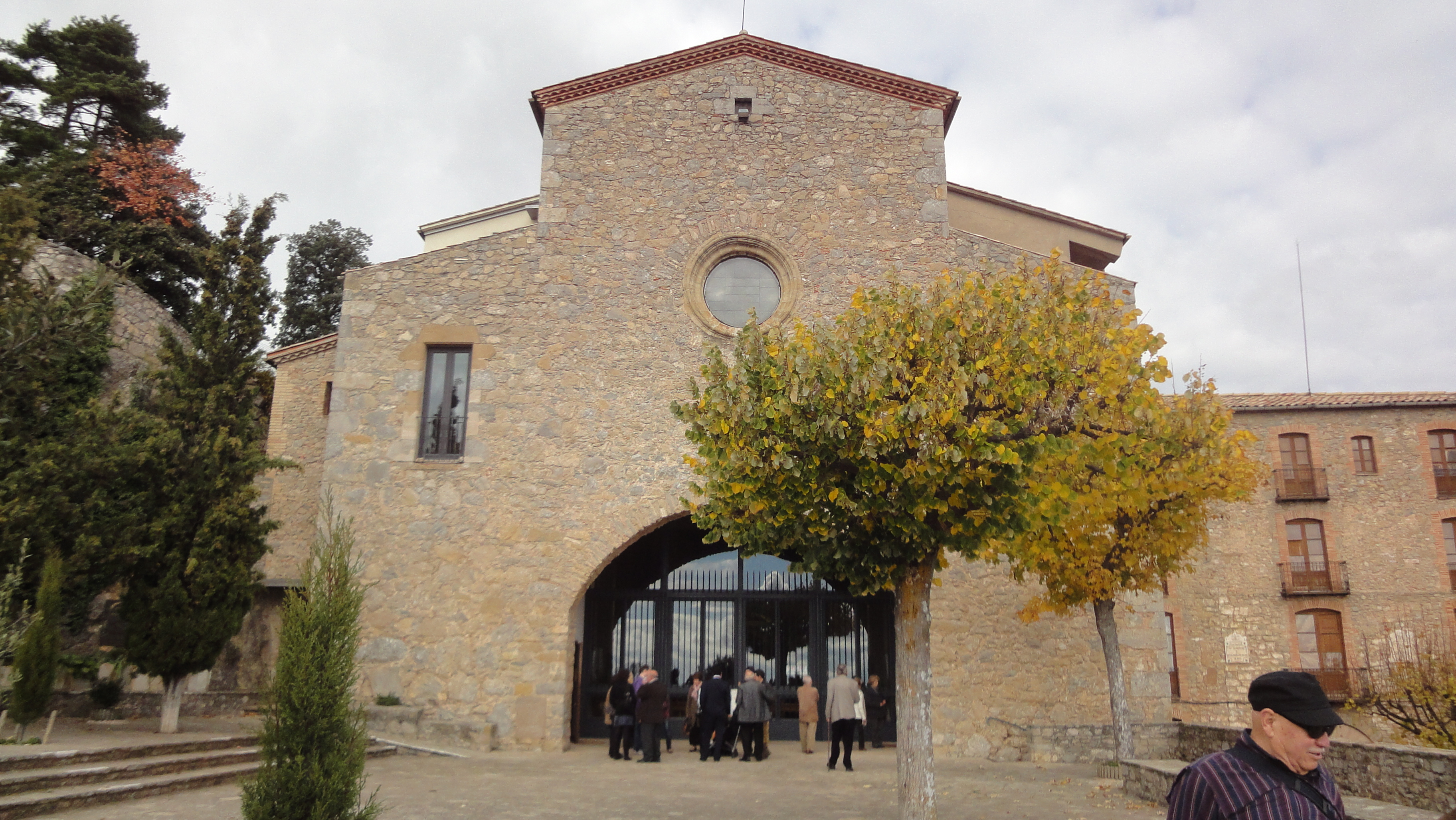 Façana del Santuari de Queralt